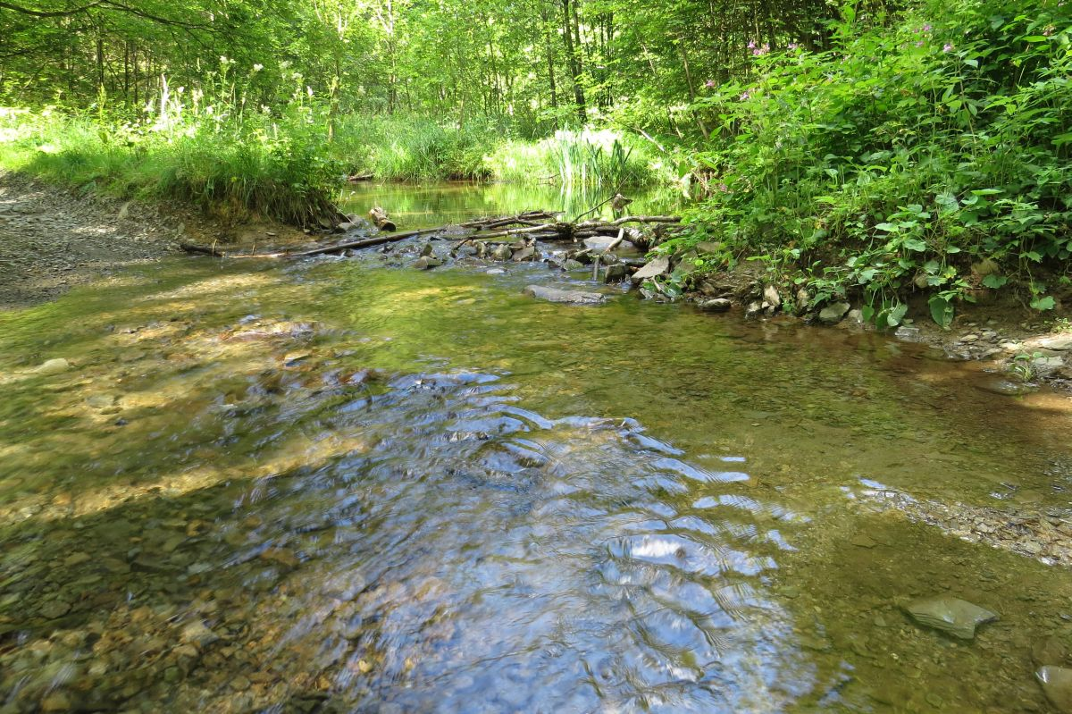 Furt über den (Schwarzen) Langenbach, kurz vor der Mündung in die Ilse